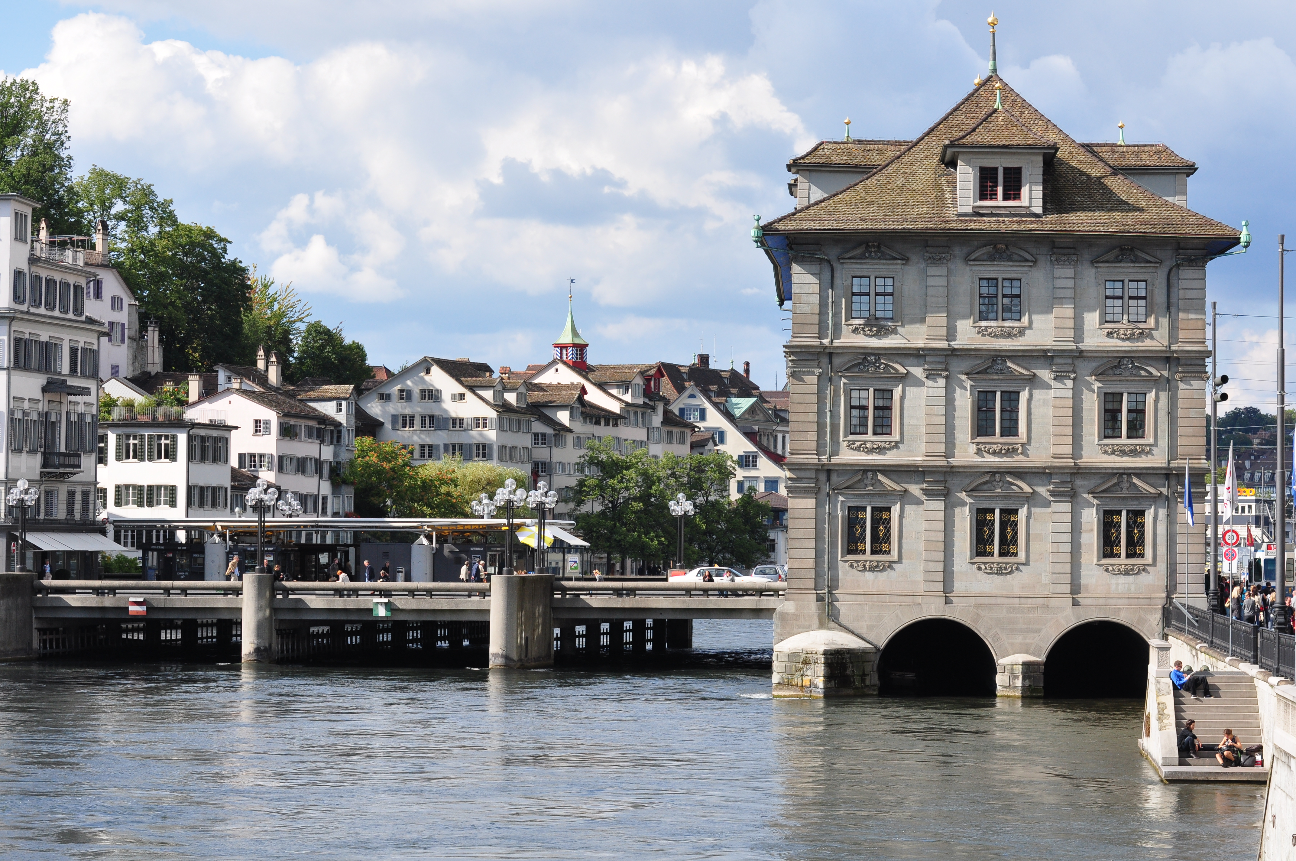 Rathaus in Zürich (Switzerland), as seen from Münsterbrücke, Schipfe and Rathausbrücke (Gmüesbrugg) to the left, Limmatquai to the right.